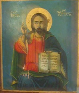 Икона на Исус Христос во манастирската црква Св. Илија во прилеоско Пештани